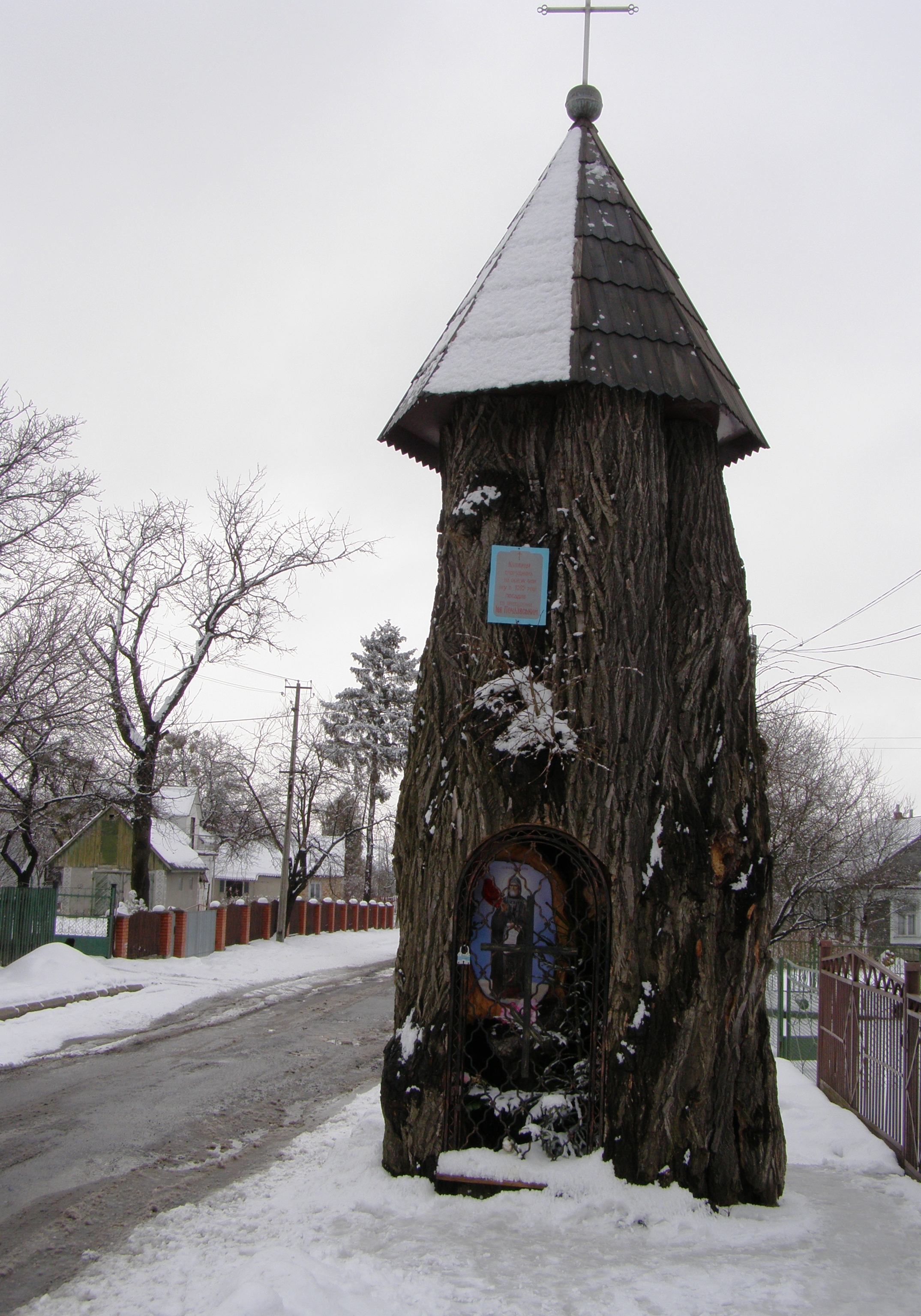 «Почаївська липа», Кременецький район, м. Почаїв, вул. Липова, біля лісництва